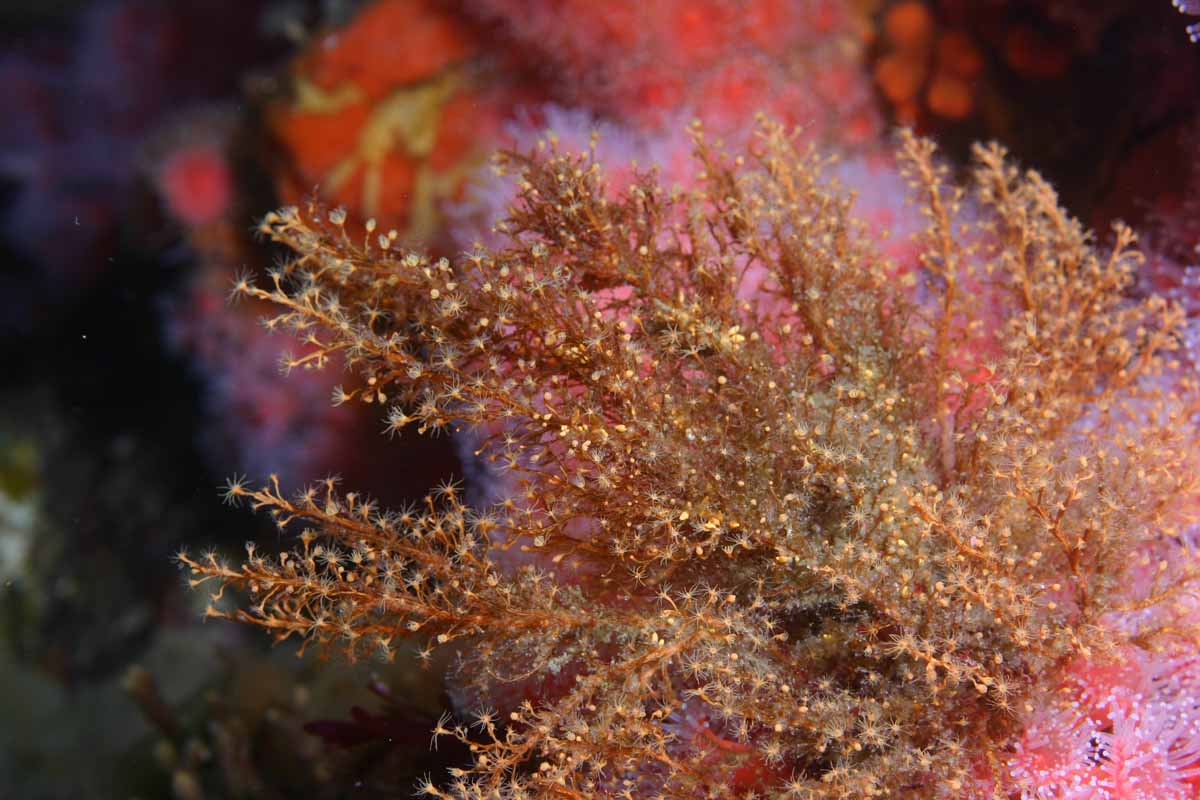 Eudendrium californicum en la bahía de Carmel, EE.UU.